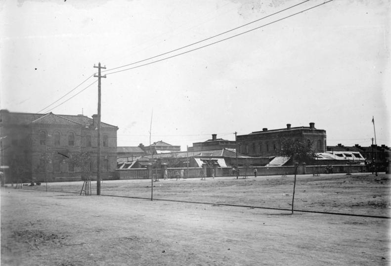 China, Tientsin Russische Niederlassung